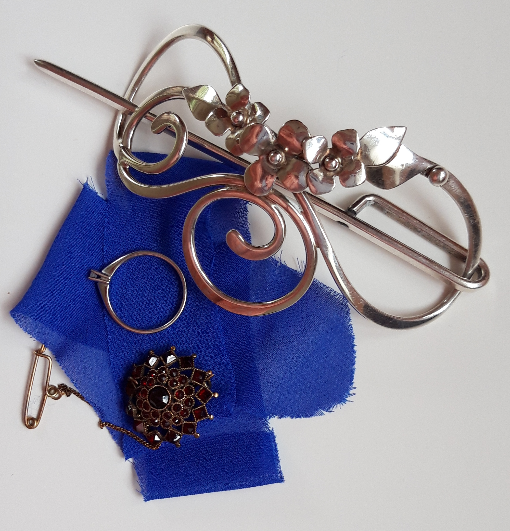 something old something new something borrowed something blue. gedragen door een Nederlandse bruid op 25 juni 2019. Een geleende zilveren haarspeld, een oude broche met granaten, een recent gekregen nieuwe ring en een blauw accent in het haar.